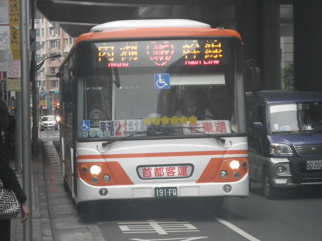 Capitalbus DAEWOO BS120CN 191-FQ